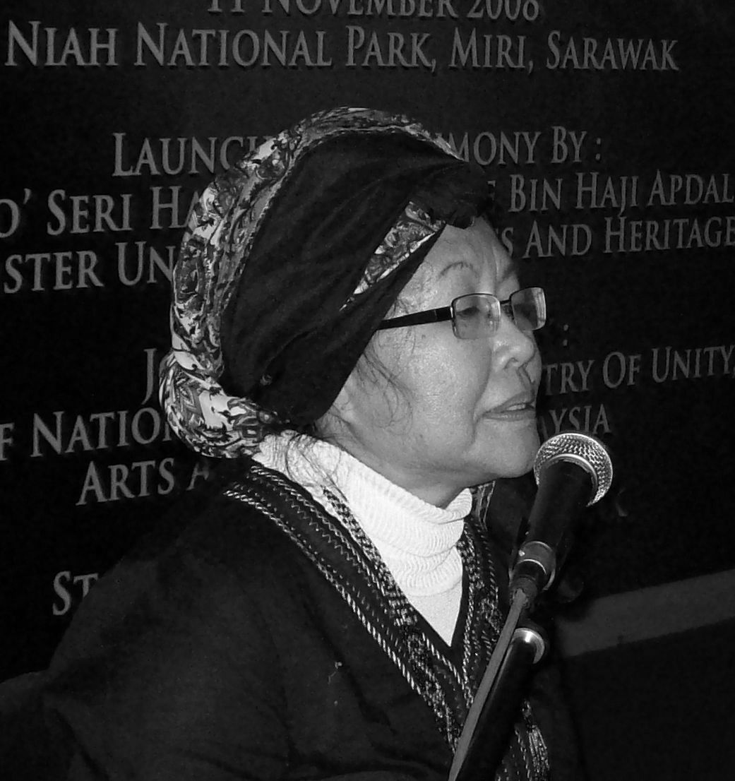 Foto dari arkib Victor Pogadaev, dibuaat pada 1.1.2007